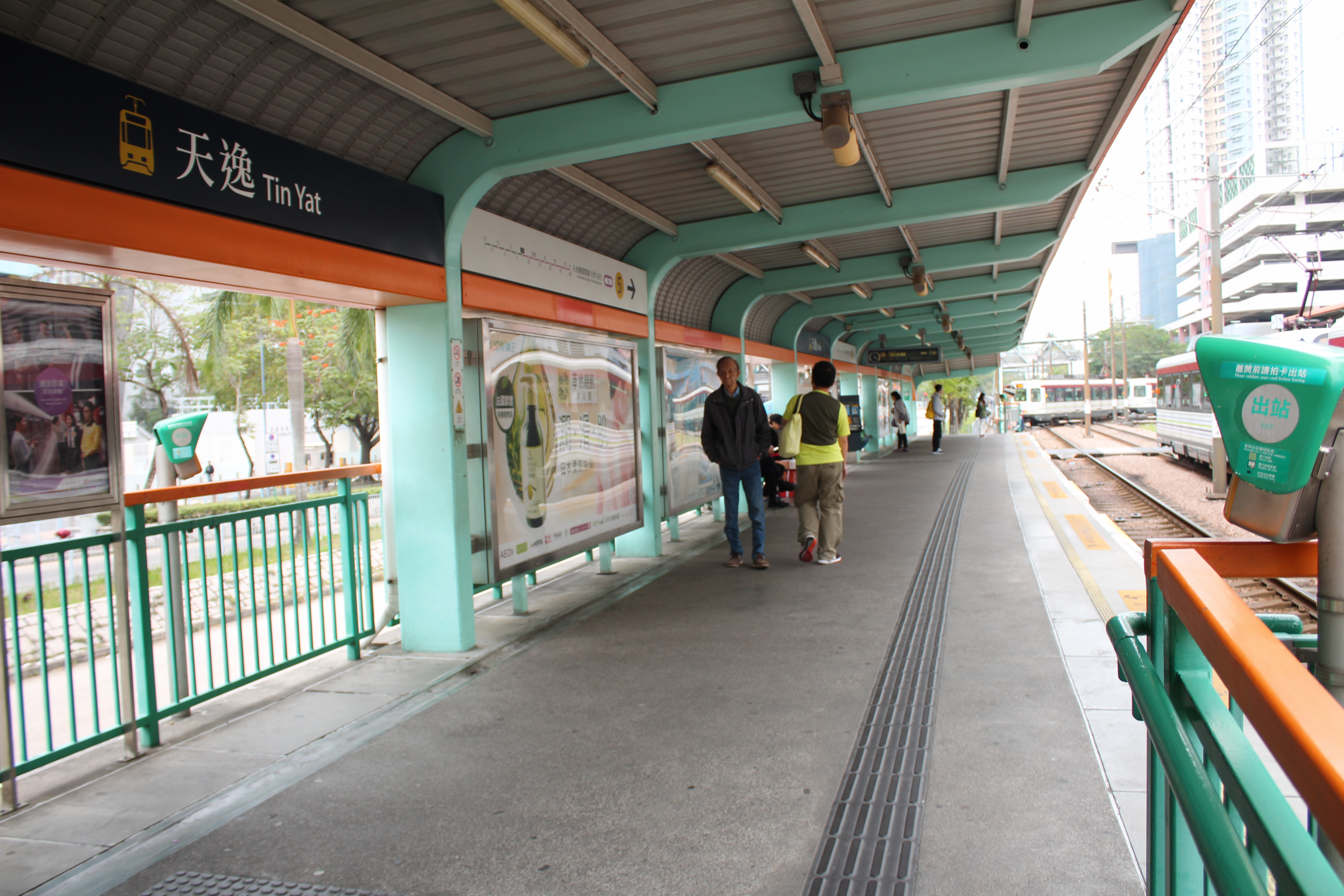 天逸站5號月台